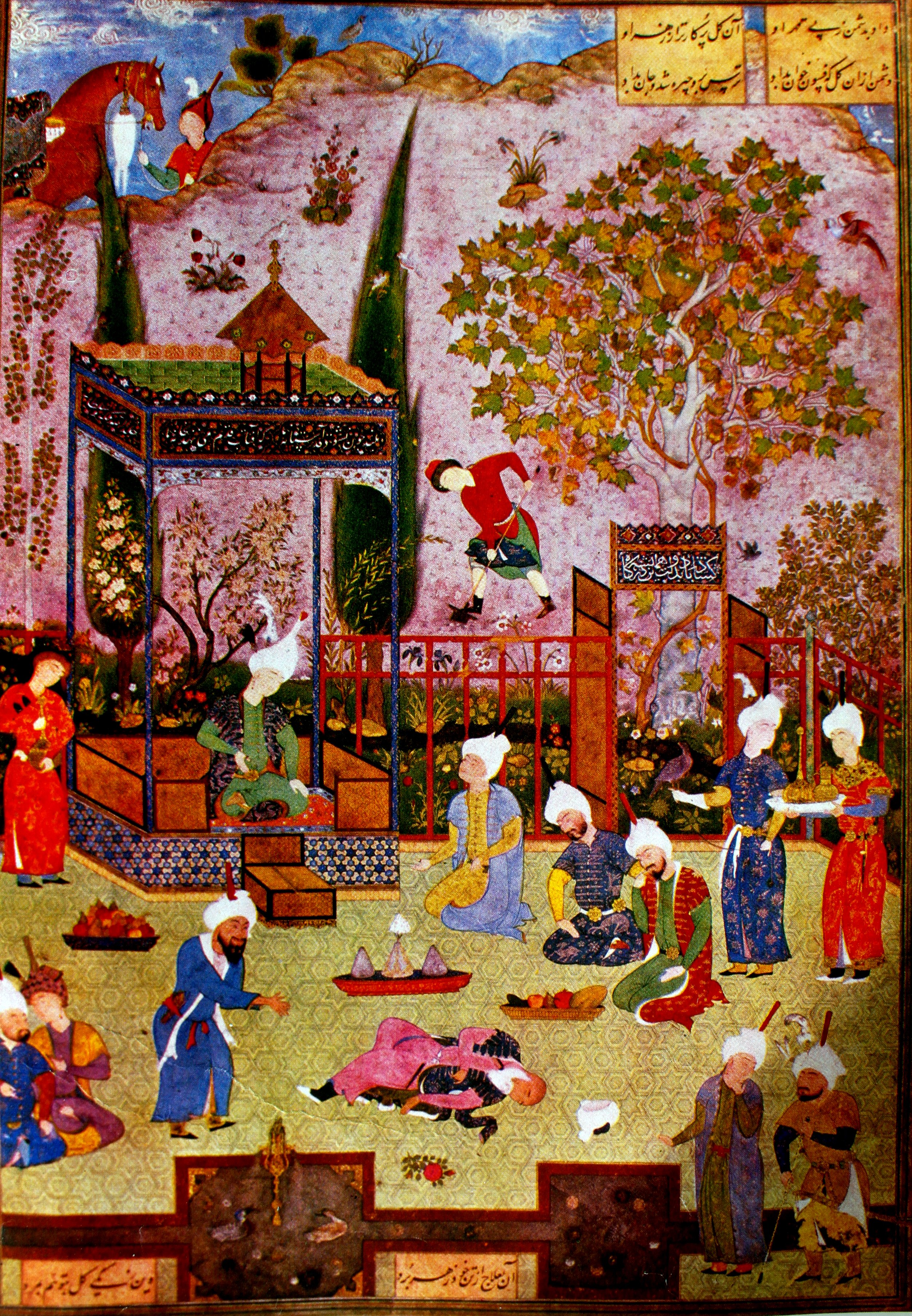 İki rəqib alimin hekayəti, 1539-1543, Təbriz miniatür məktəbi